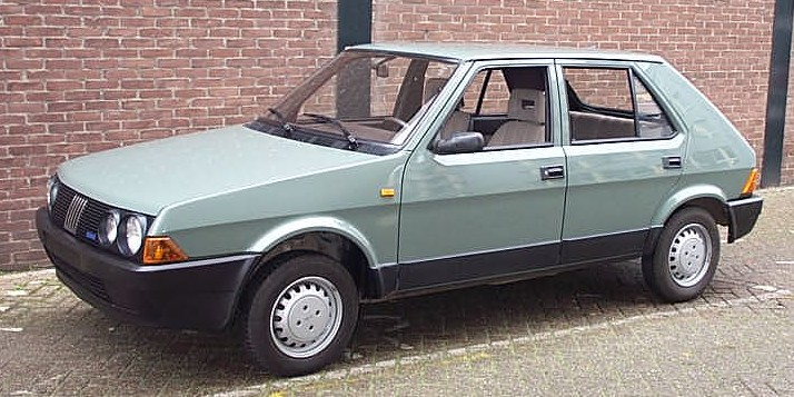 Fiat Ritmo 60L 1987